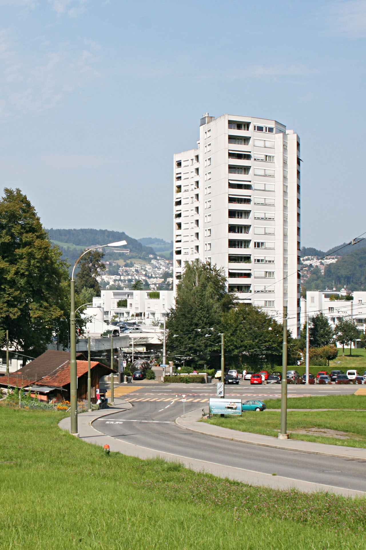 Das Schönbühl-Hochhaus sowie der östliche Teil des Shopping Centers Schönbühl von der Hirtenhofstrasse aus fotografiert